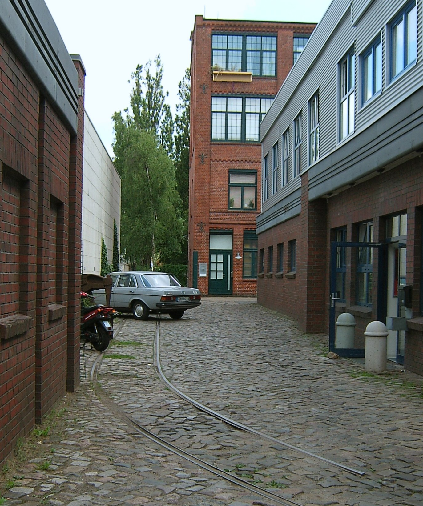 Hamburg, Bahrenfeld, Gleisrest der Ottenser Industriebahn in der Stahltwiete